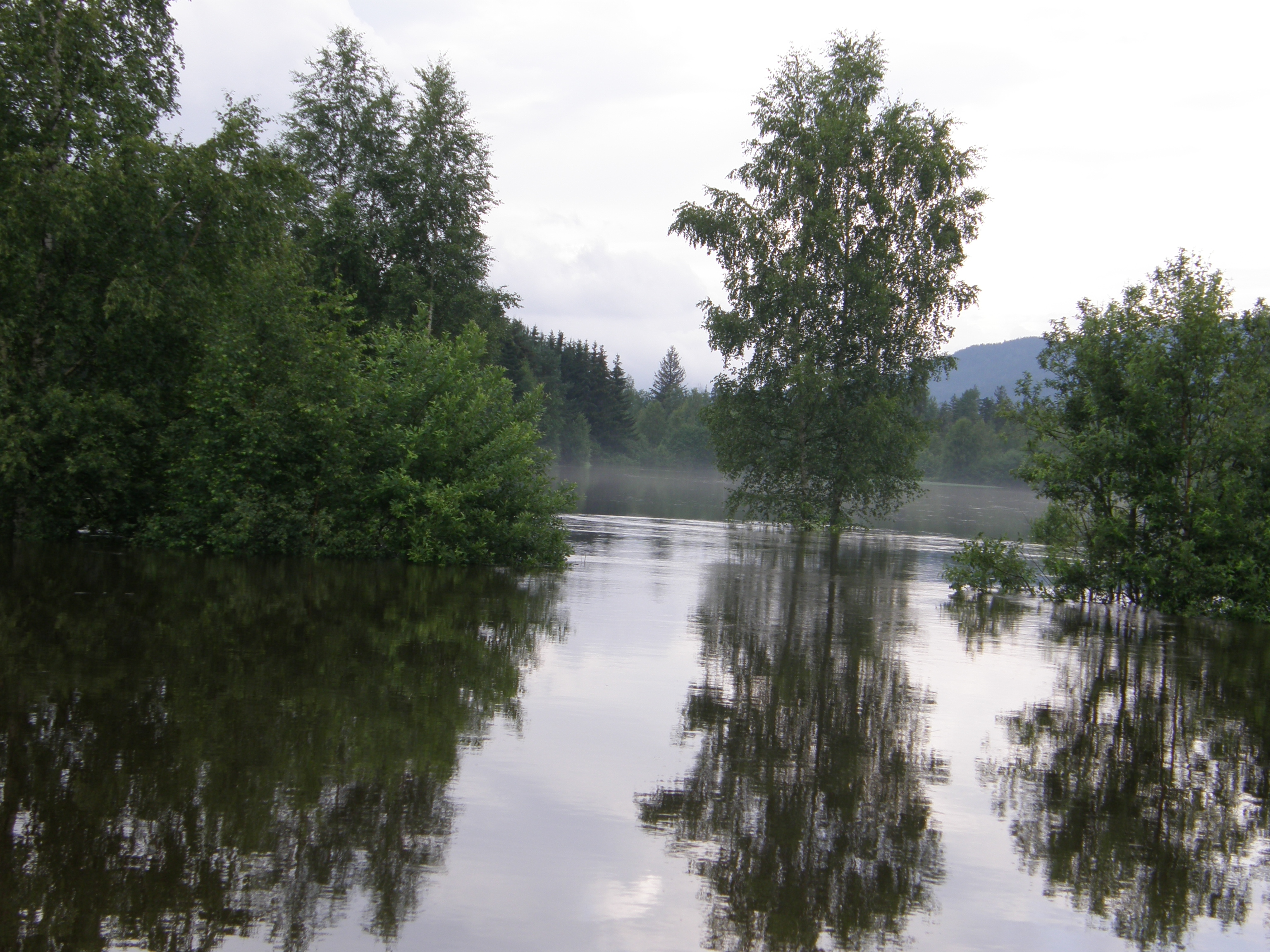 Sogna (flomstor i juli 2007)